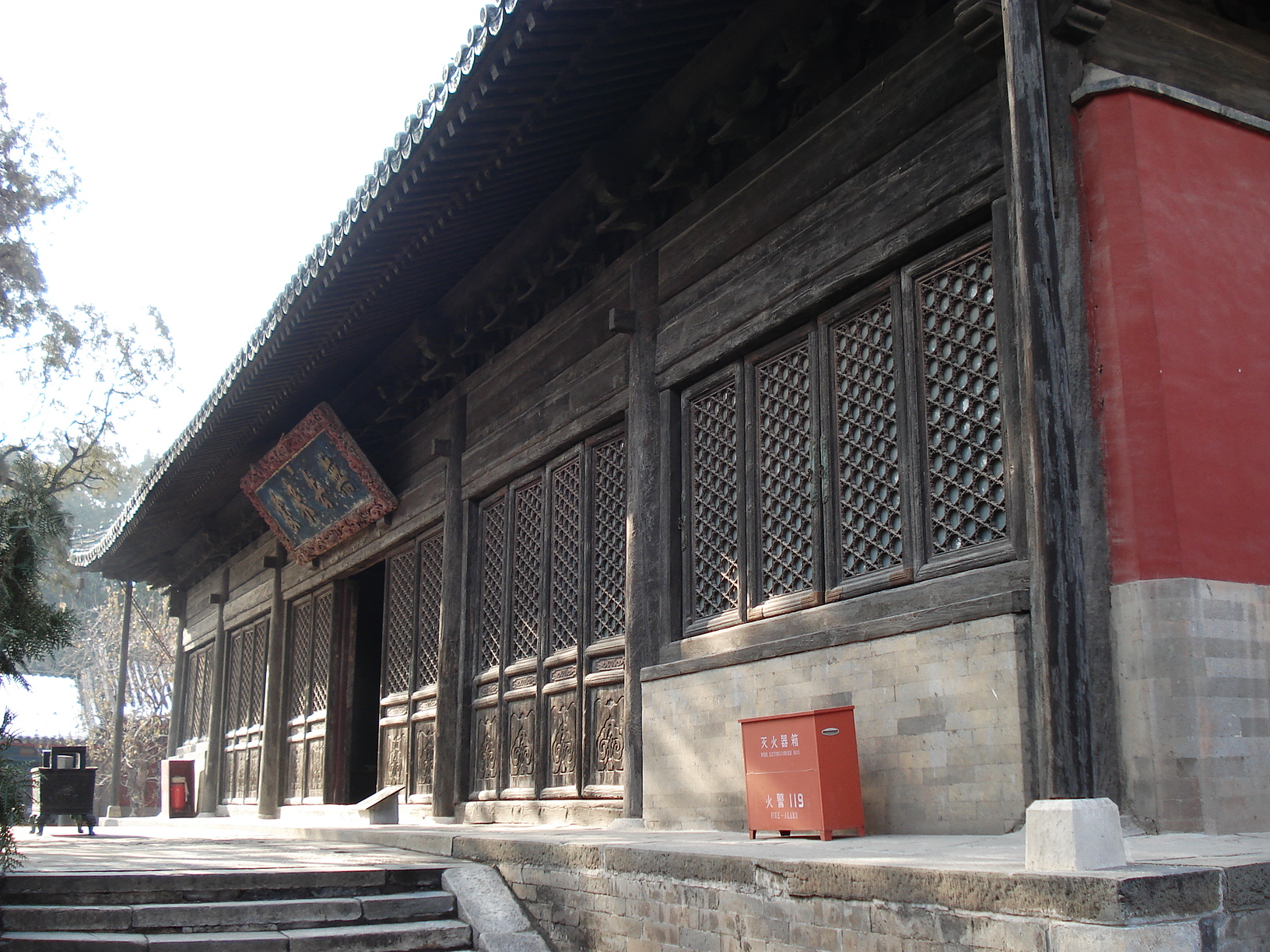 北京大觉寺大雄宝殿立面。